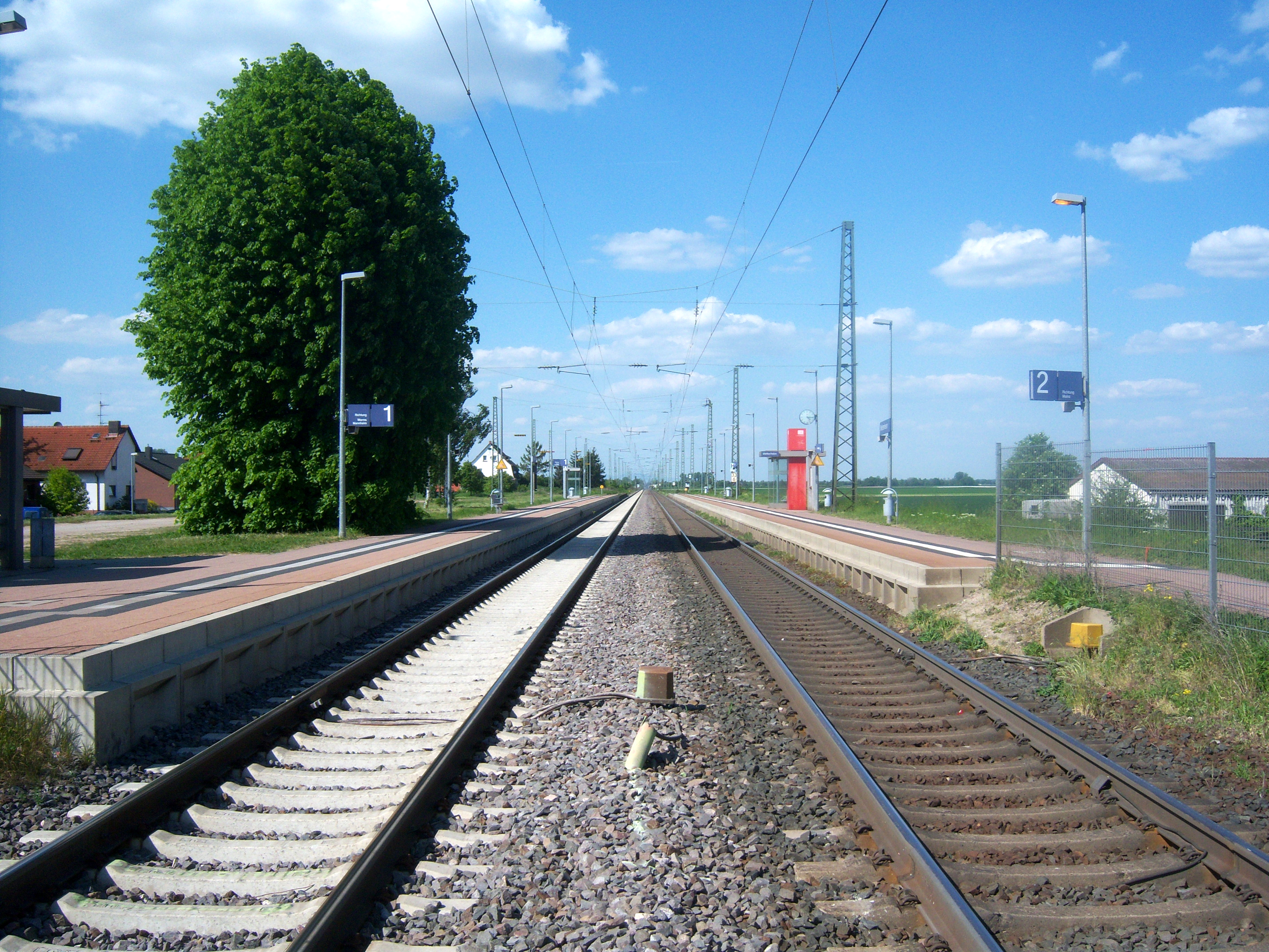 Der Mettenheimer Bahnhof in Rheinhessen